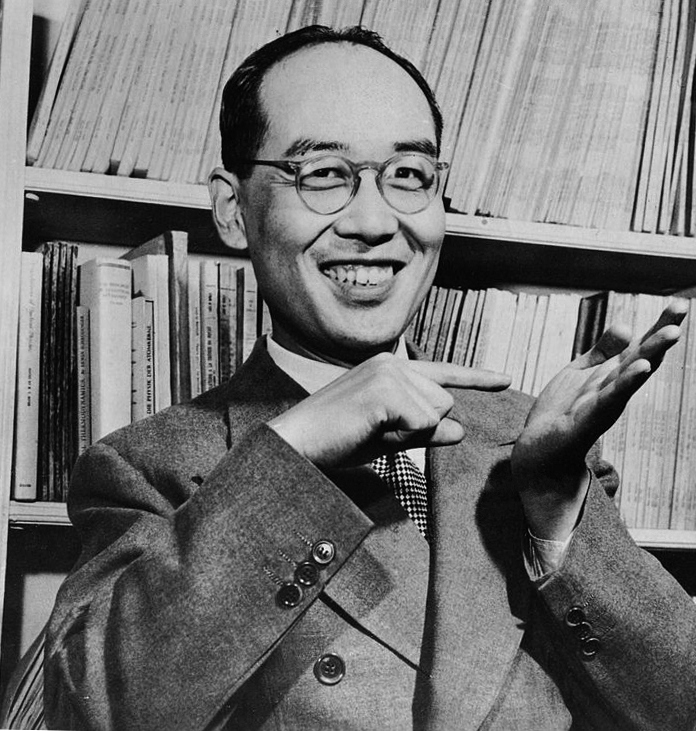 Japanese physicist Hideki Yukawa is seen in April 1951 in Japan.